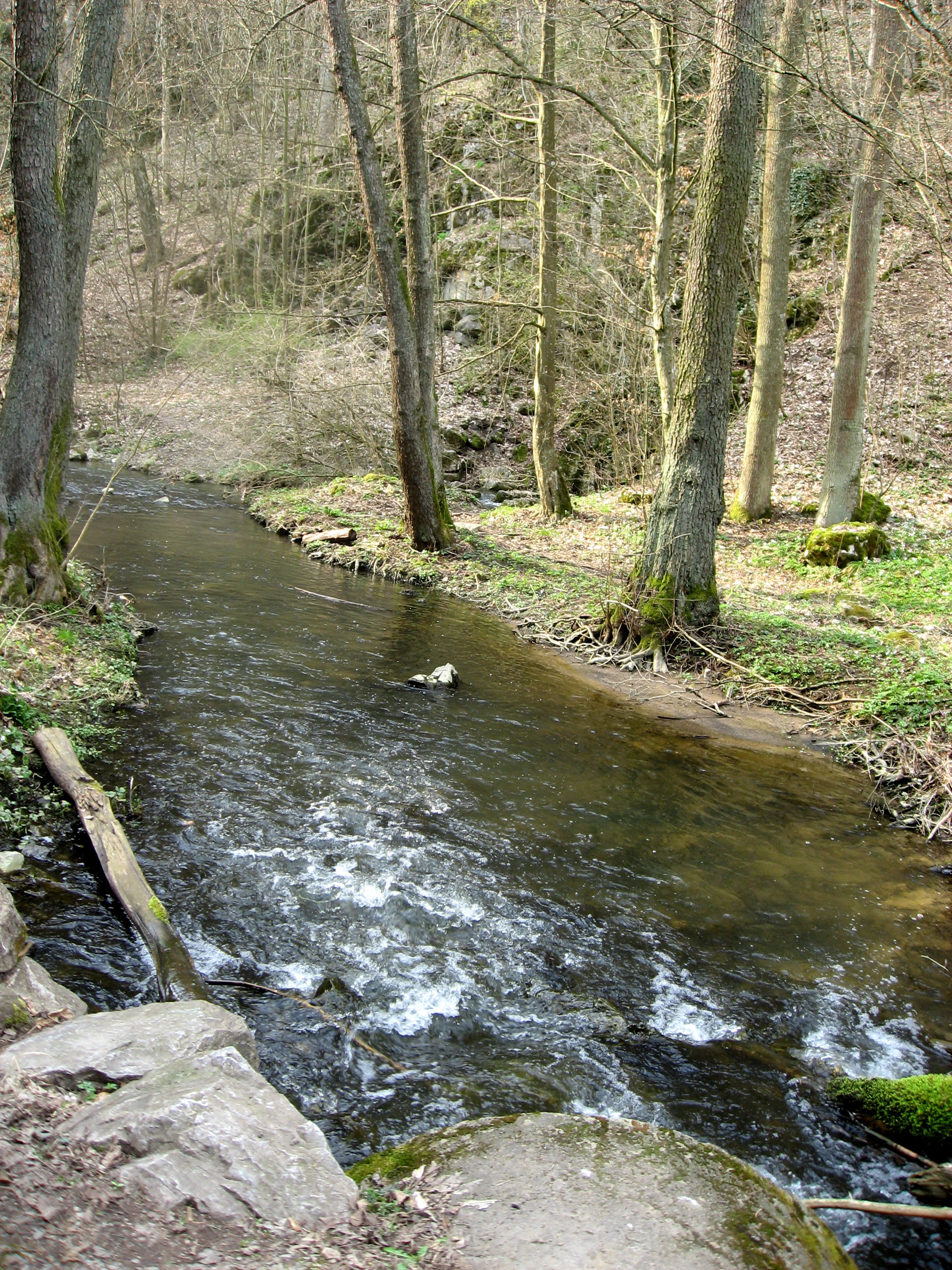 Údolí Říčky